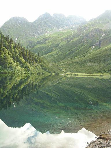 Горное озеро Кардывач